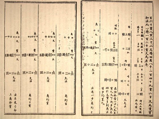 Présentation d'un calcul avec baguettes à calculer - Traité mathématique en neuf chapitres (Shushu jiu zhang) - XIIIe siècle